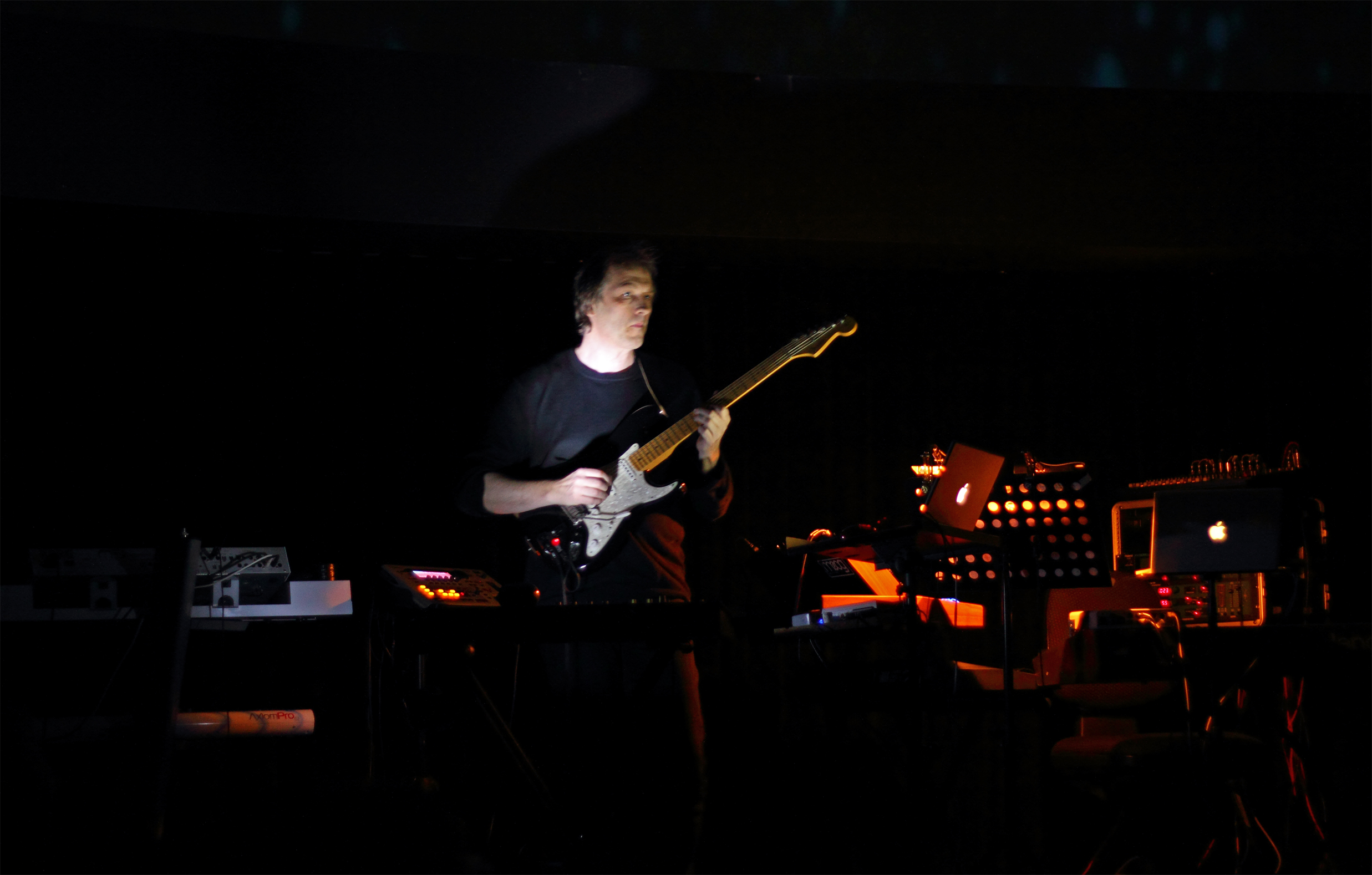 Verleihung des Schallwelle-Musikpreises am 10. März 2012. Kuppel des Planetariums Bochum. Konzert von Erik Wøllo.